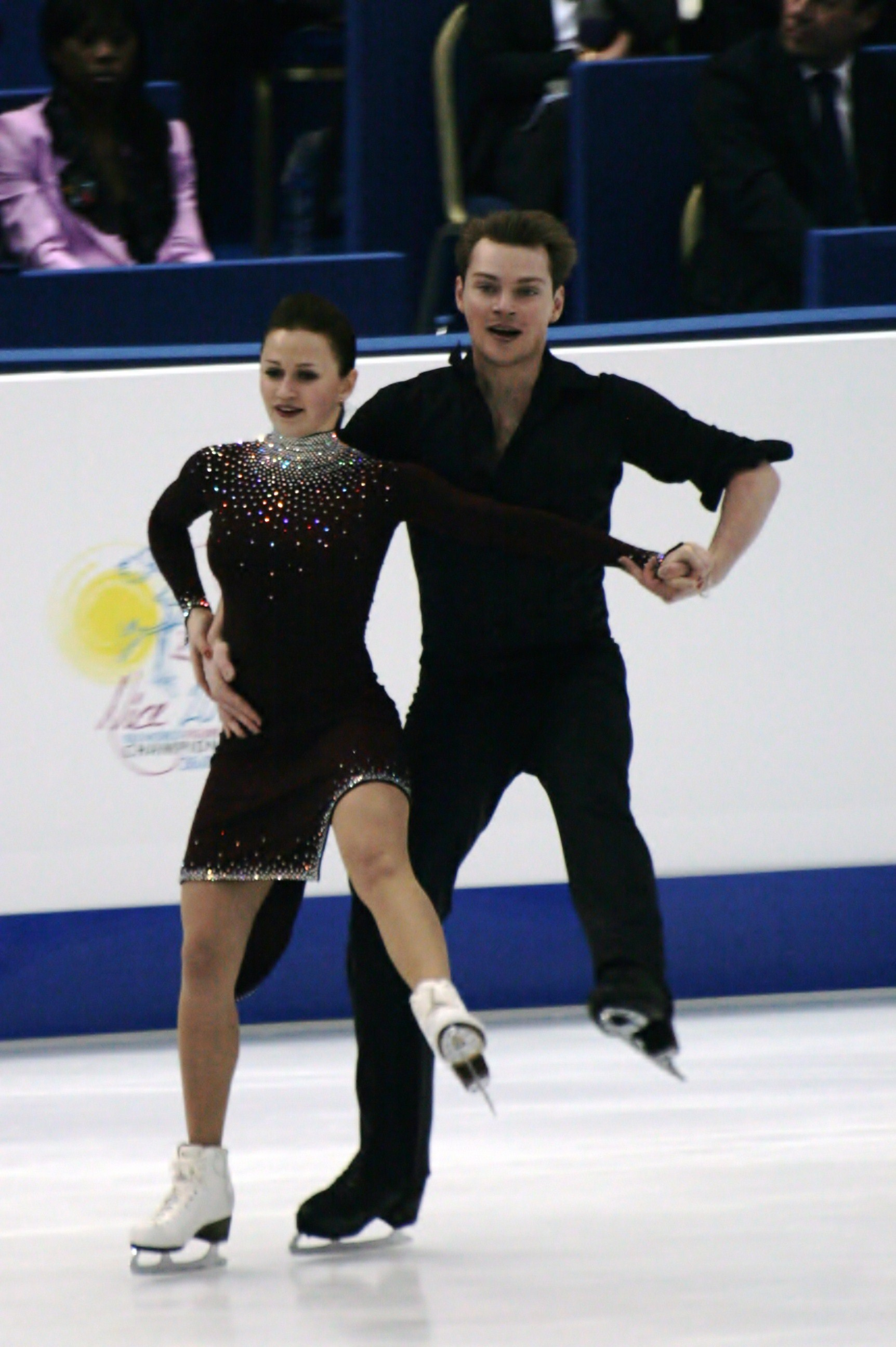 Юлия Злобина и Алексей Ситников (Азербайджан) на чемпионате мира по фигурному катанию 2012